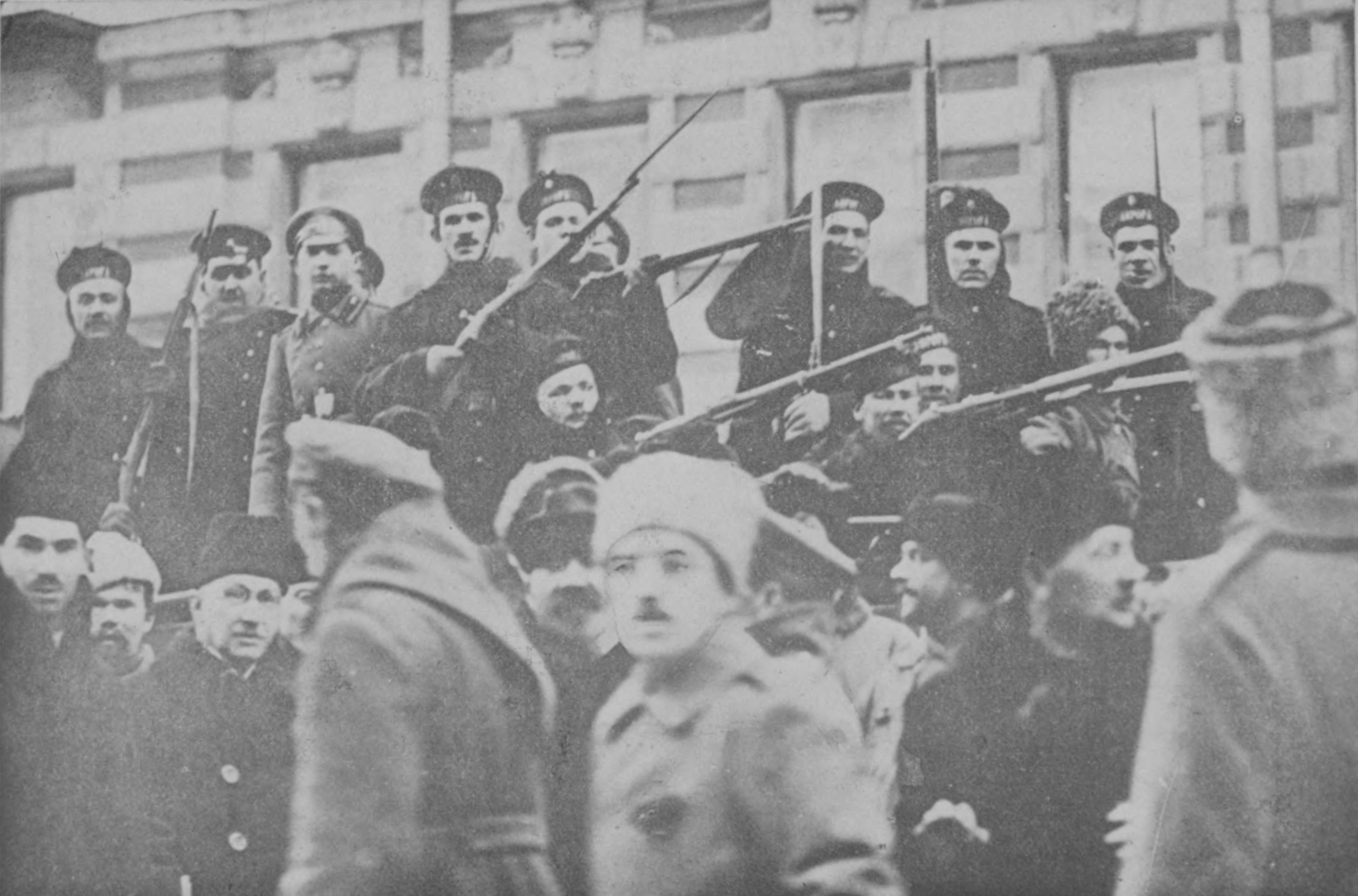 Marineros revolucionarios.